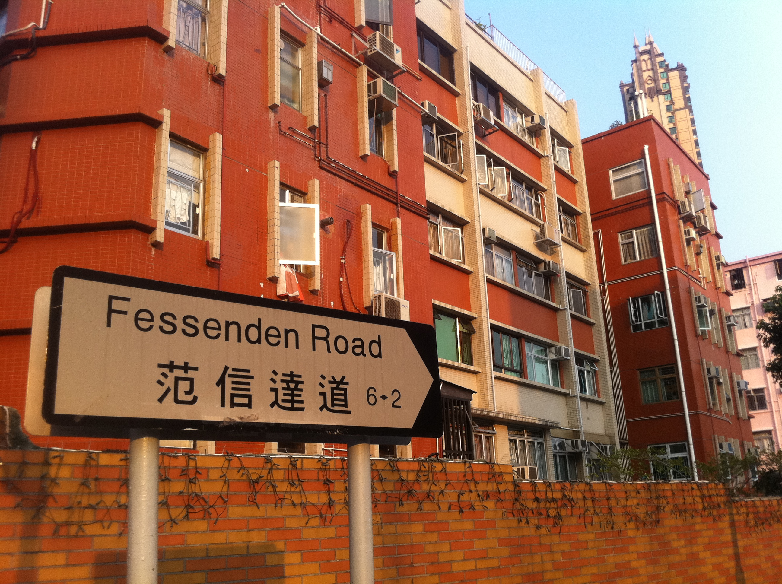 中文（香港）: 九龍塘范信達道